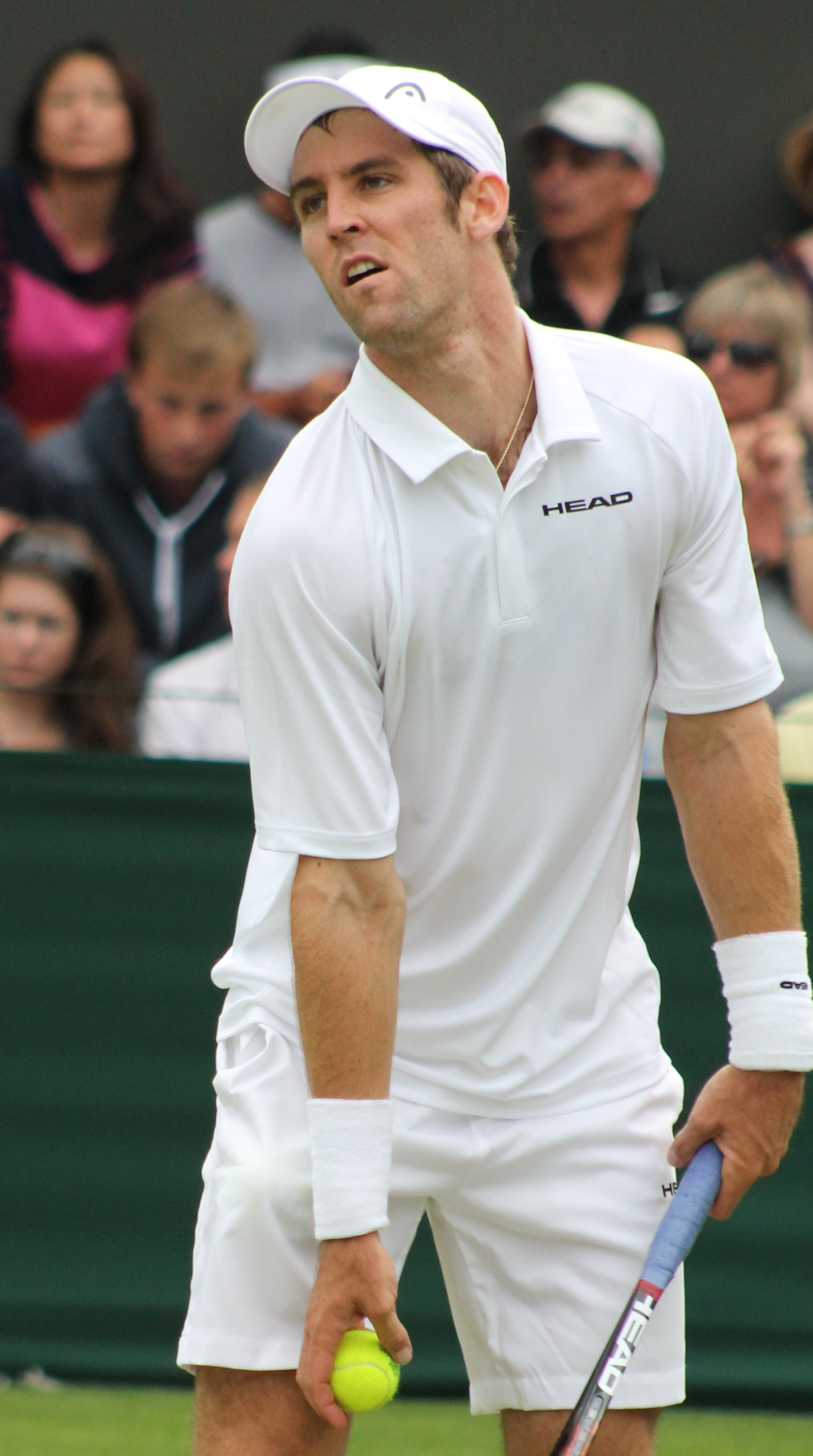 Klahn WM14 (11)